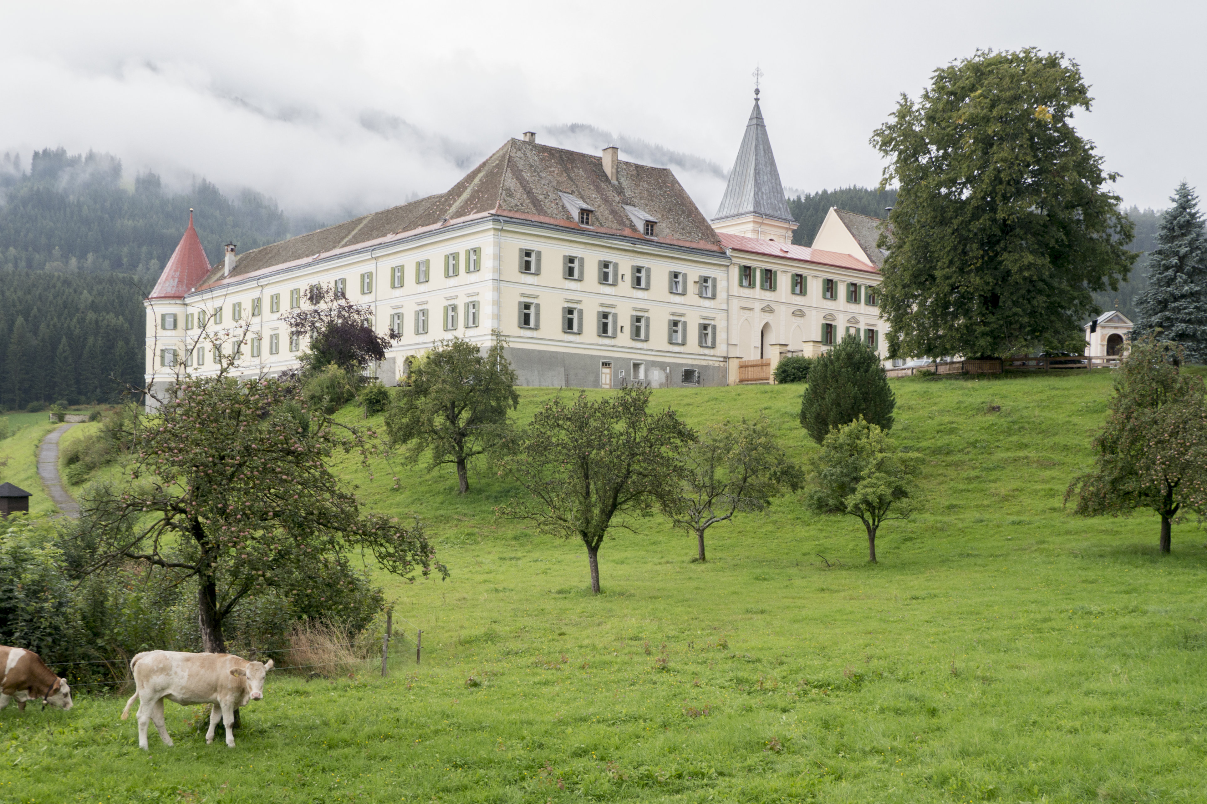 Schloss, Burg-/Schlosskapelle